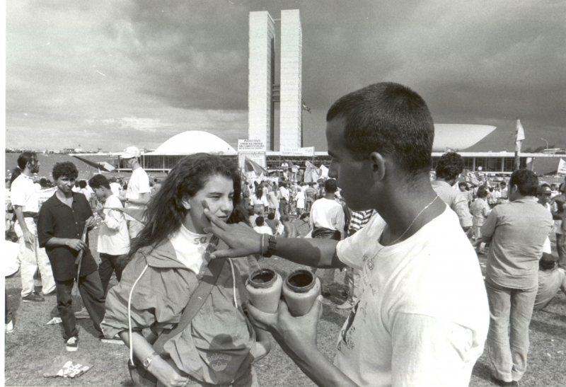 Cara pintadas durante manifestação no Palácio do Planalto.